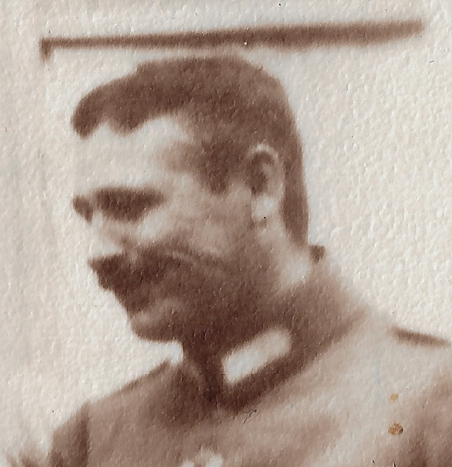 Portrait von Karl Josef Schlitt im Jahr 1916 beim Besuch seines Geburtsortes Obertiefenbach (heute Beselich)